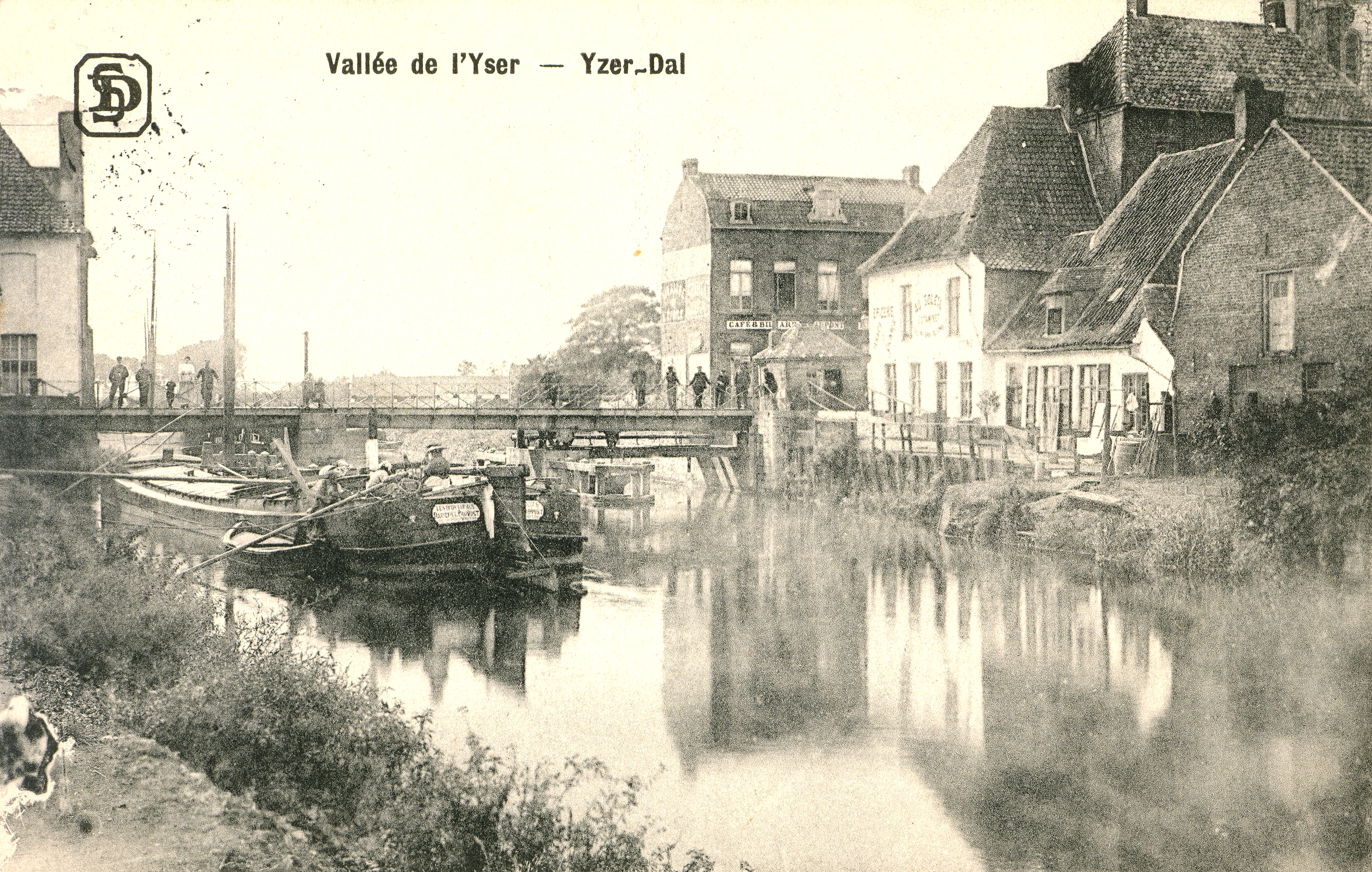 Feldpostkarte aus dem Jahre 1916: "Vallee de l'Yser"